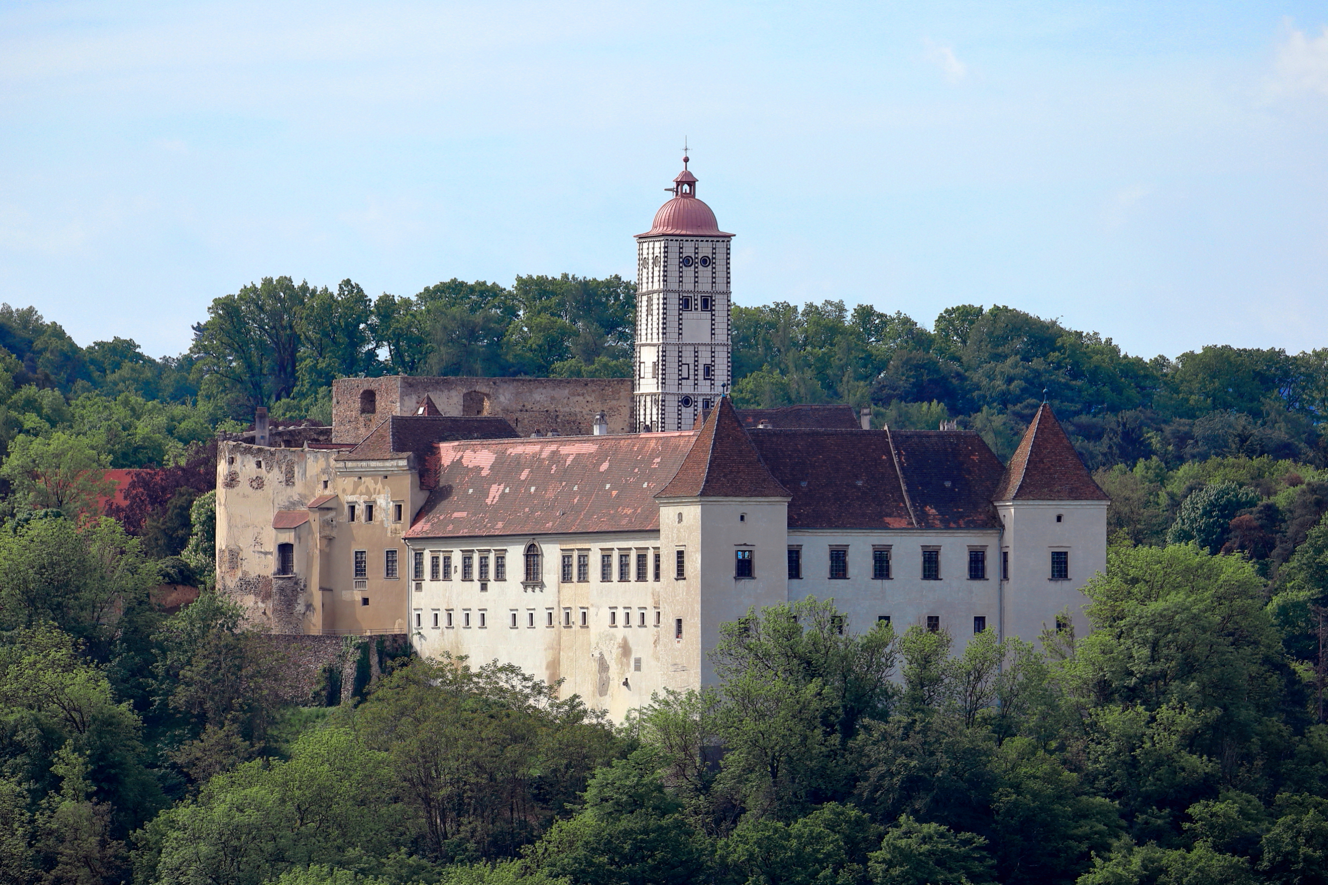 Die Nordansicht des Schlosses Schallaburg in Schallaburg, ein Ortsteil der niederösterreichischen Gemeinde Schollach. Graf Sighard von Schala der Jüngere ließ die Schallaburg in der 1. Hälfte des 12. Jahrhunderts errichten. Im 13. bis 15. Jahrhundert erfolgten Zubauten wie beispielsweise die gotische Kapelle. Unter Christoph II. von Losenstein fand ab 1540 der Umbau der Burg zu einem Renaissanceschloss statt. Dabei wurde unter anderem der nördliche Teil der Ringmauer geschliffen und 3 Renaissance-Trakte mit zwei Türmen um einen großen trapezförmigen Hof errichtet.